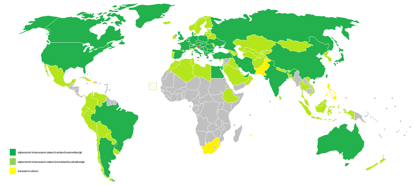 Zemljevid diplomatsko-konzularnih predstavništev Republike Sloveije